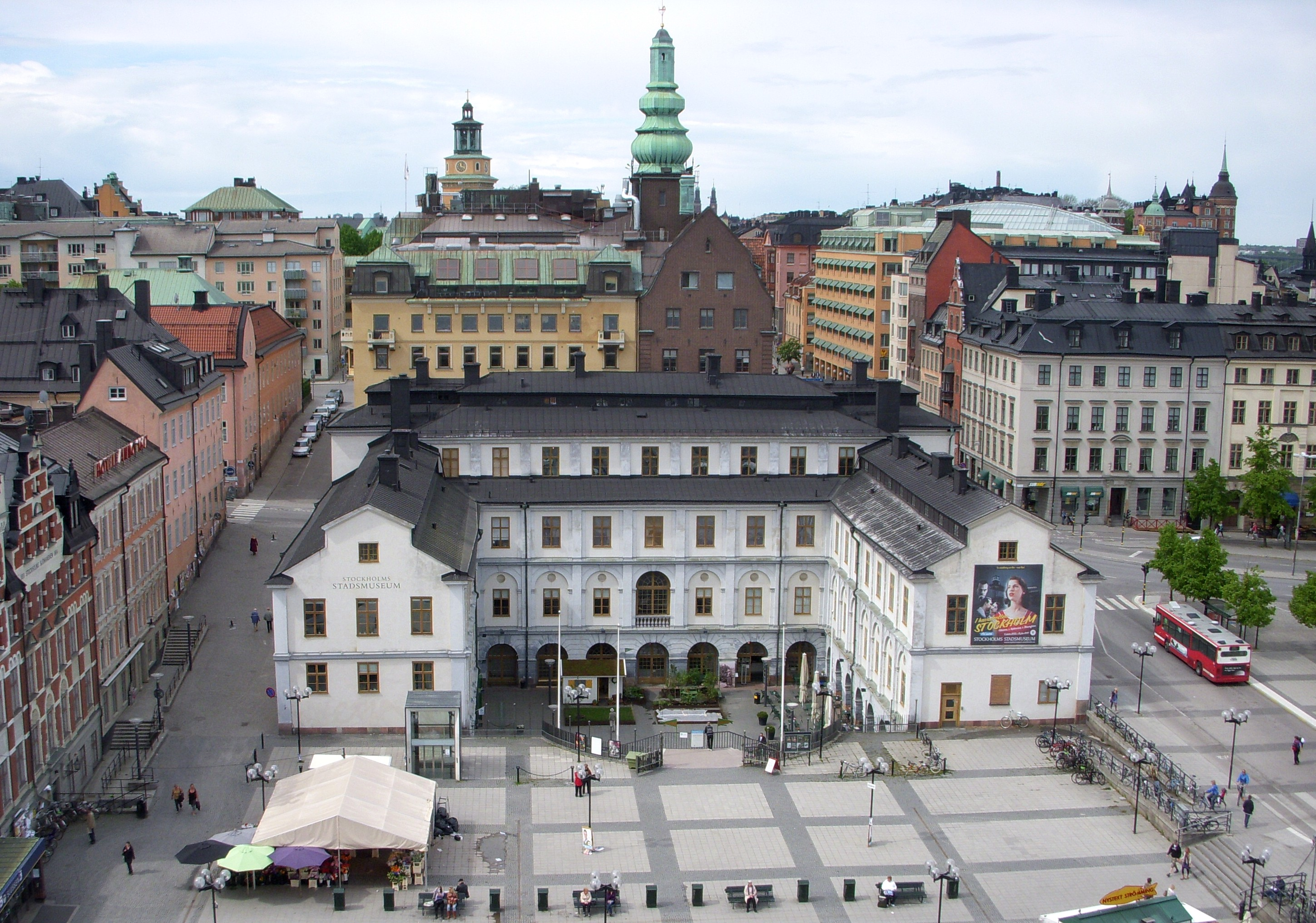 Stockholms stadsmuseum från Katarinahissen